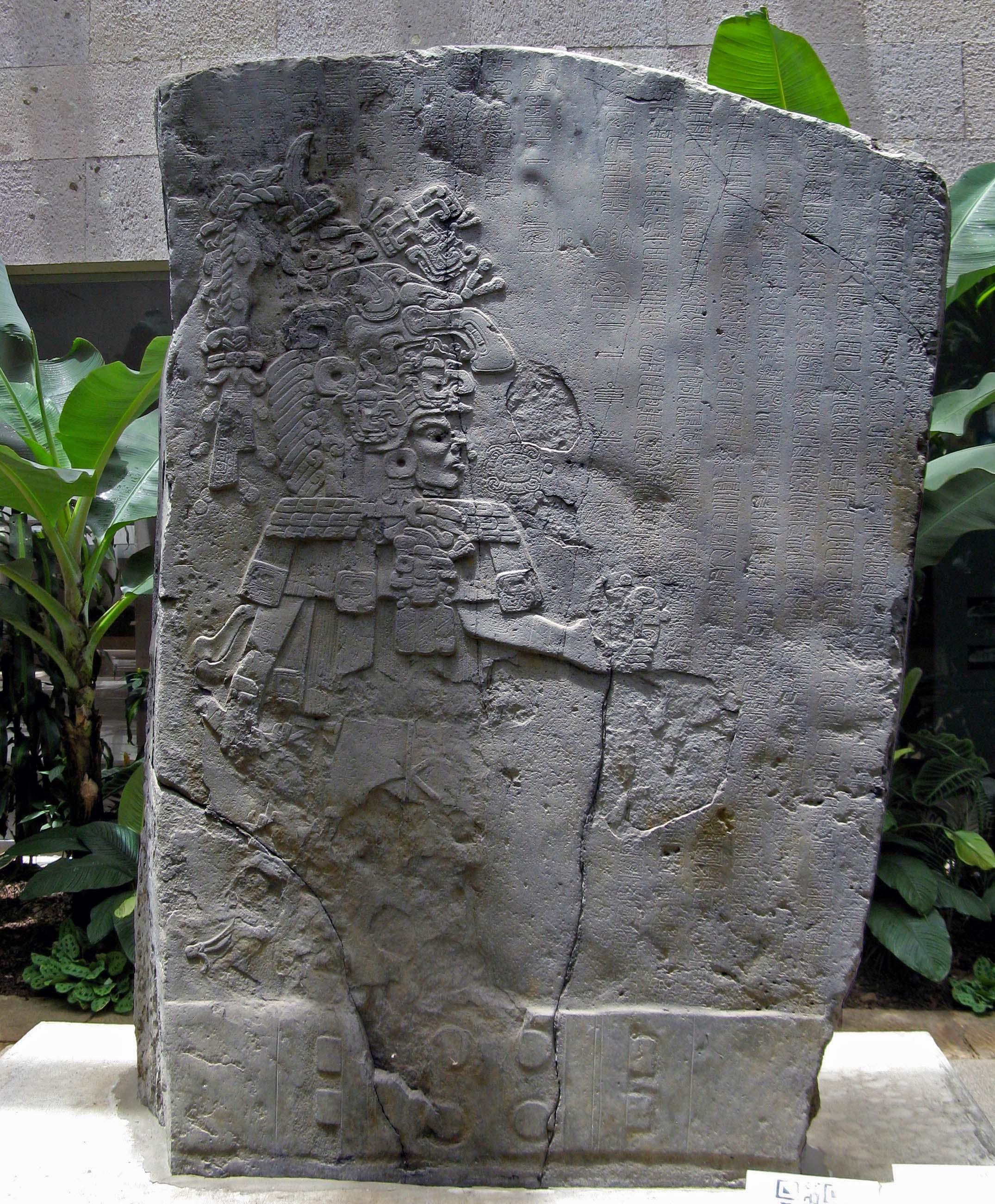 Estela 1 de La Mojarra con escritura epiolmeca